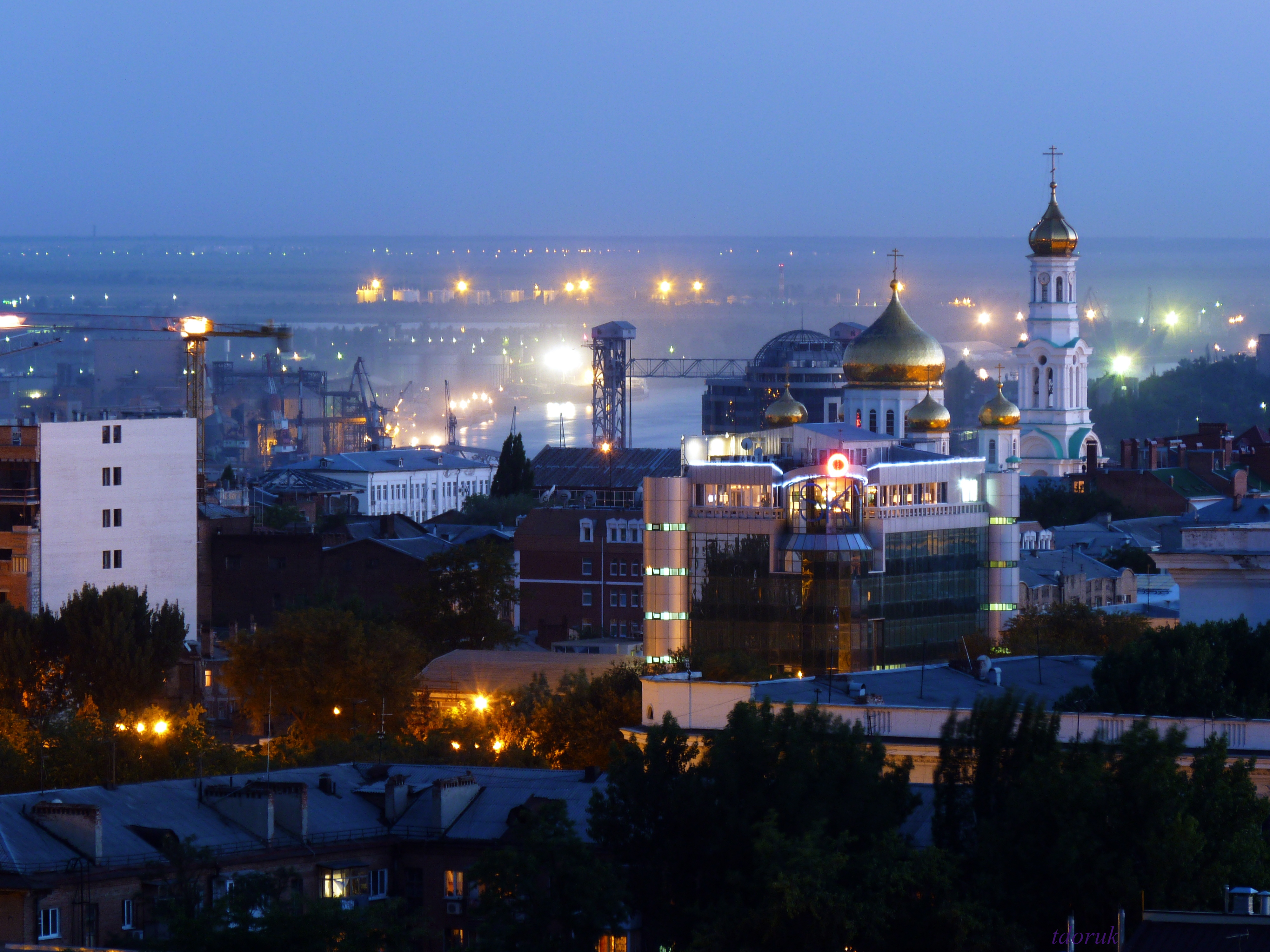 С высоты птичьего полёта, Ростов-на-Дону